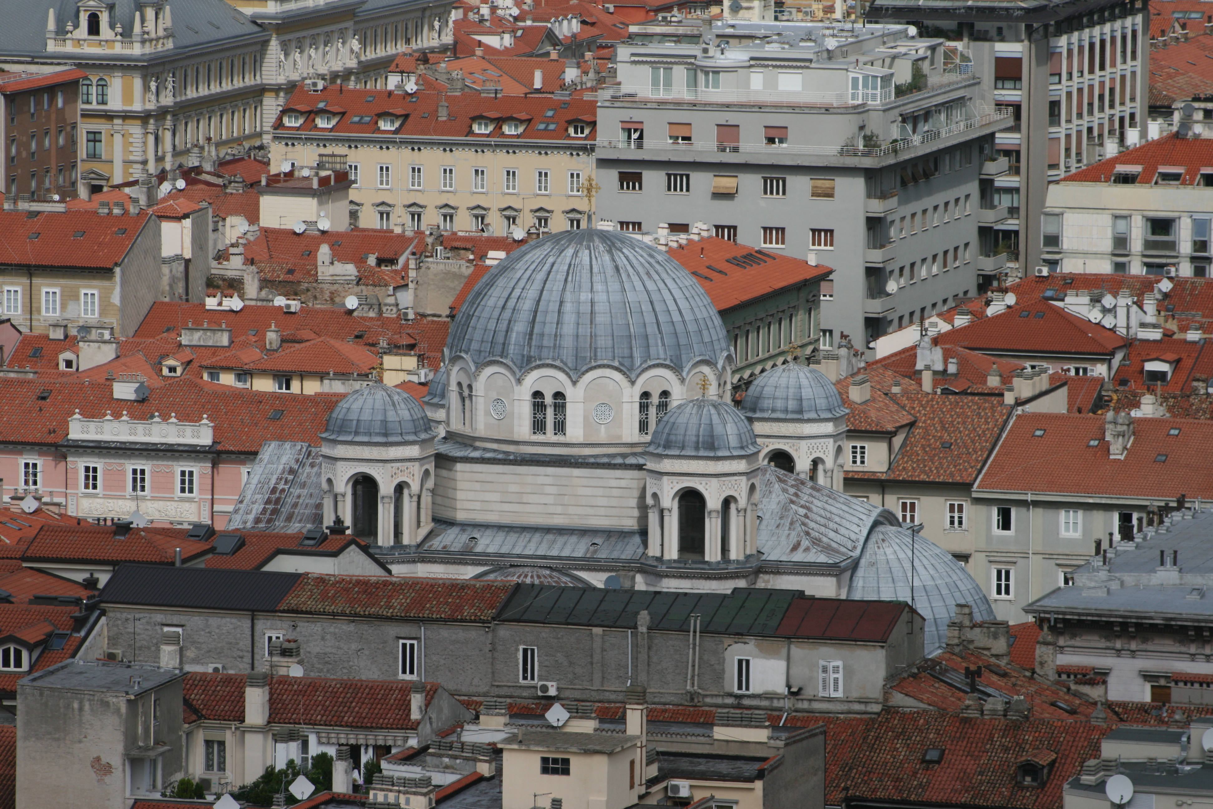 Die Kirche der Dreifaltigkeit und des Hl. Spyridon (Triest) von oben mit ihren markanten Kuppeln